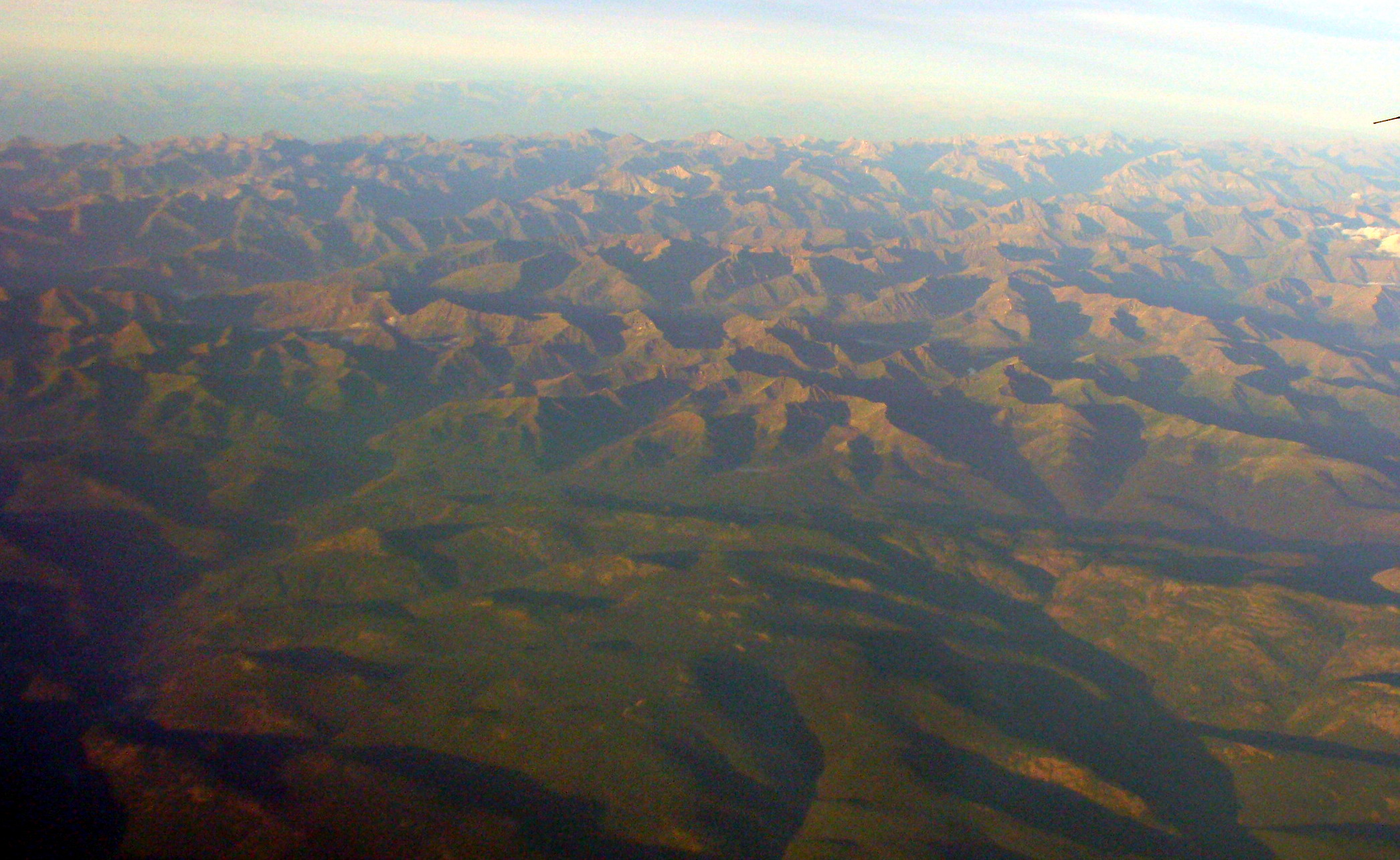 Саяны. Вид с севера на юг.